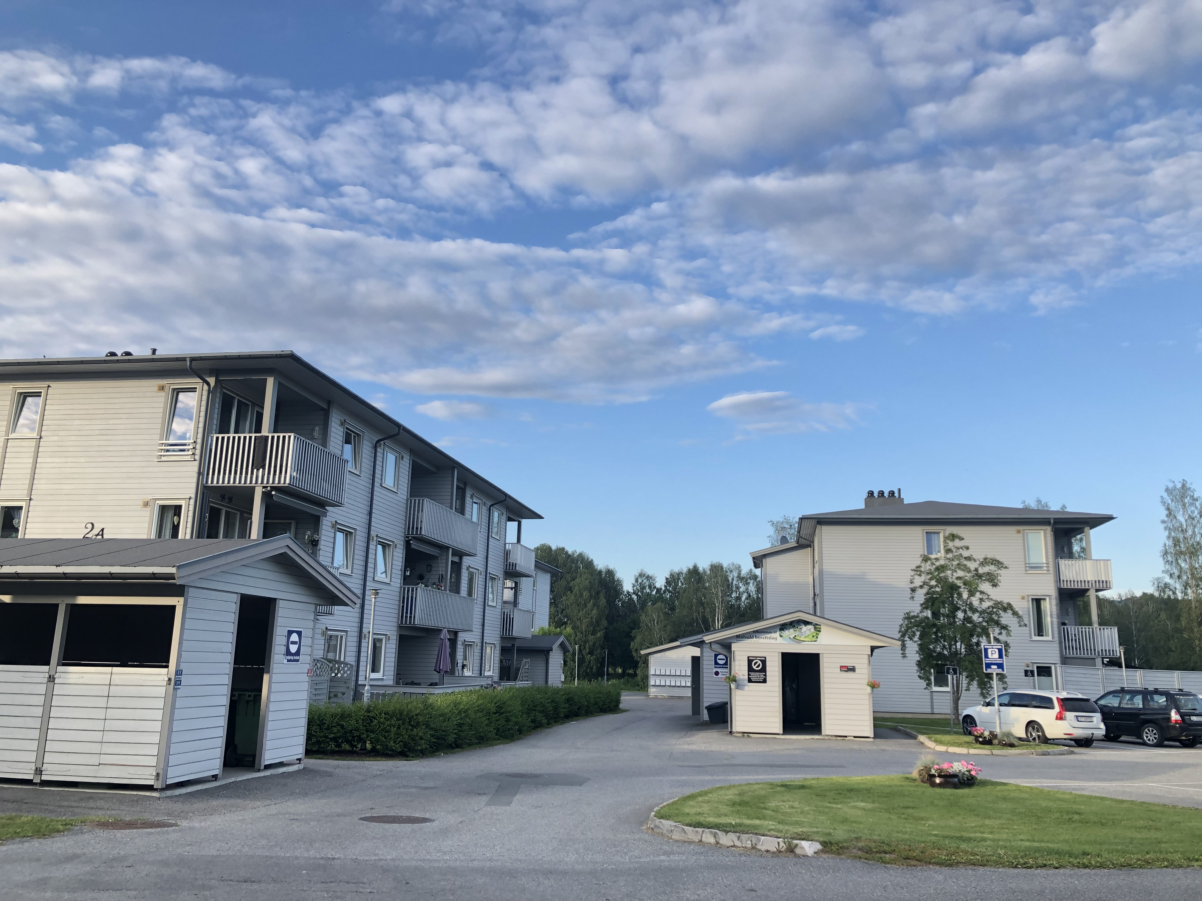 Lavblokker i Hofsfossveien i Hønefoss, 2019.